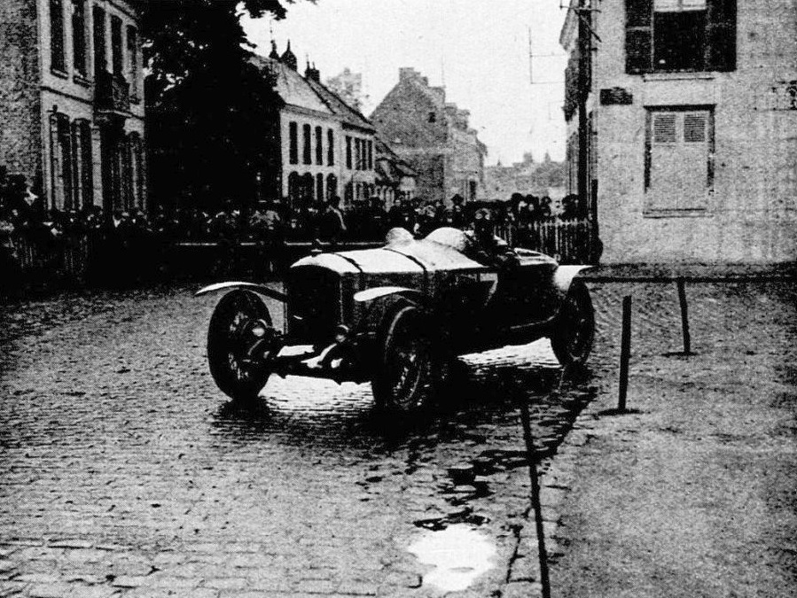 André Boillot, vainqueur du Circuit des Routes Pavées 1922, sur Peugeot 18 HP - Le Monde Illustré du 30 décembre 1922, p.3